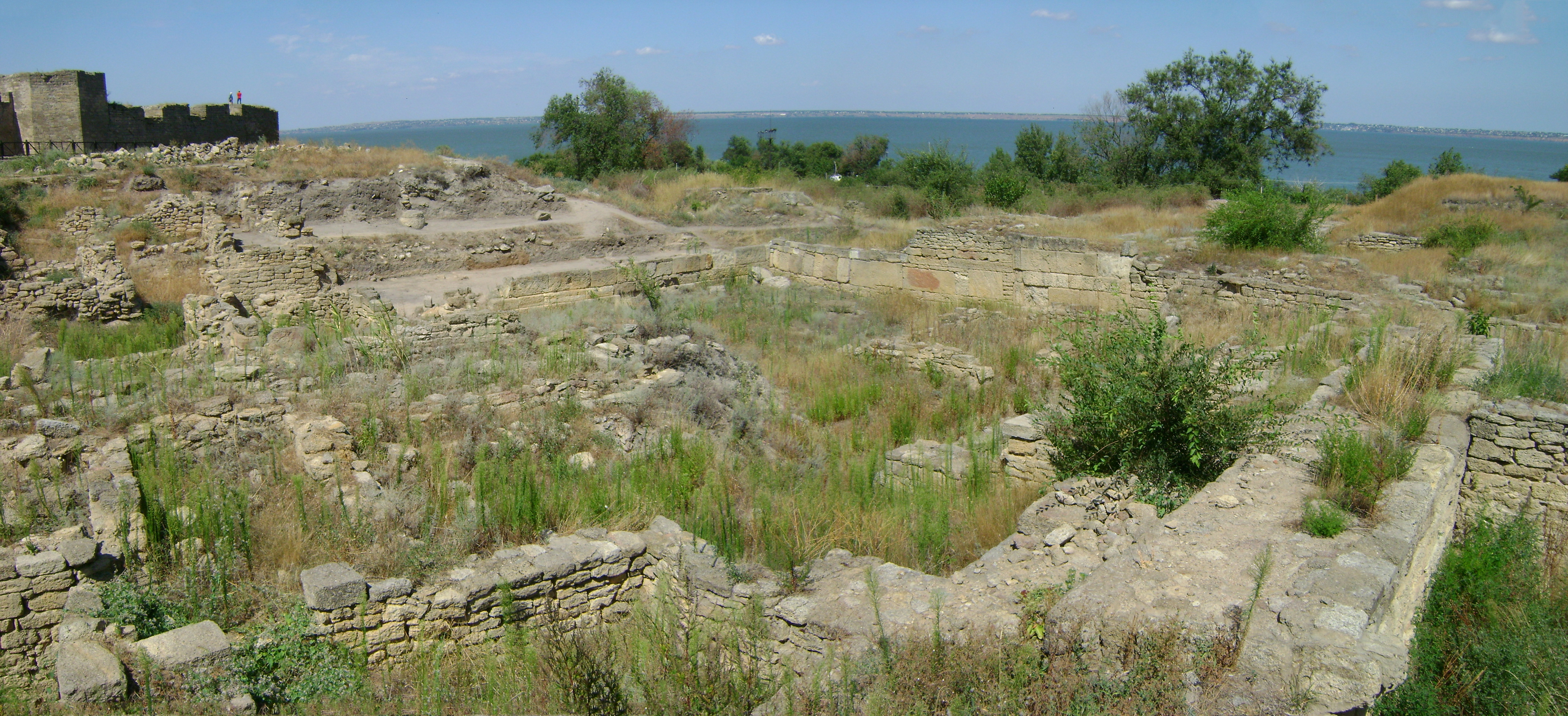 Городище «Тіра-Білгород», Білгород-Дністровський, територія фортеці і суміжна територія